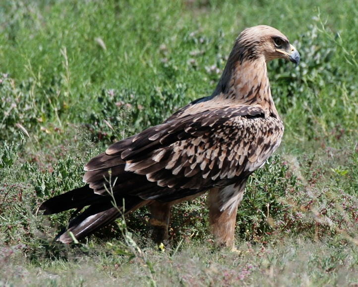 Raubadler im Etosha Nationalpark